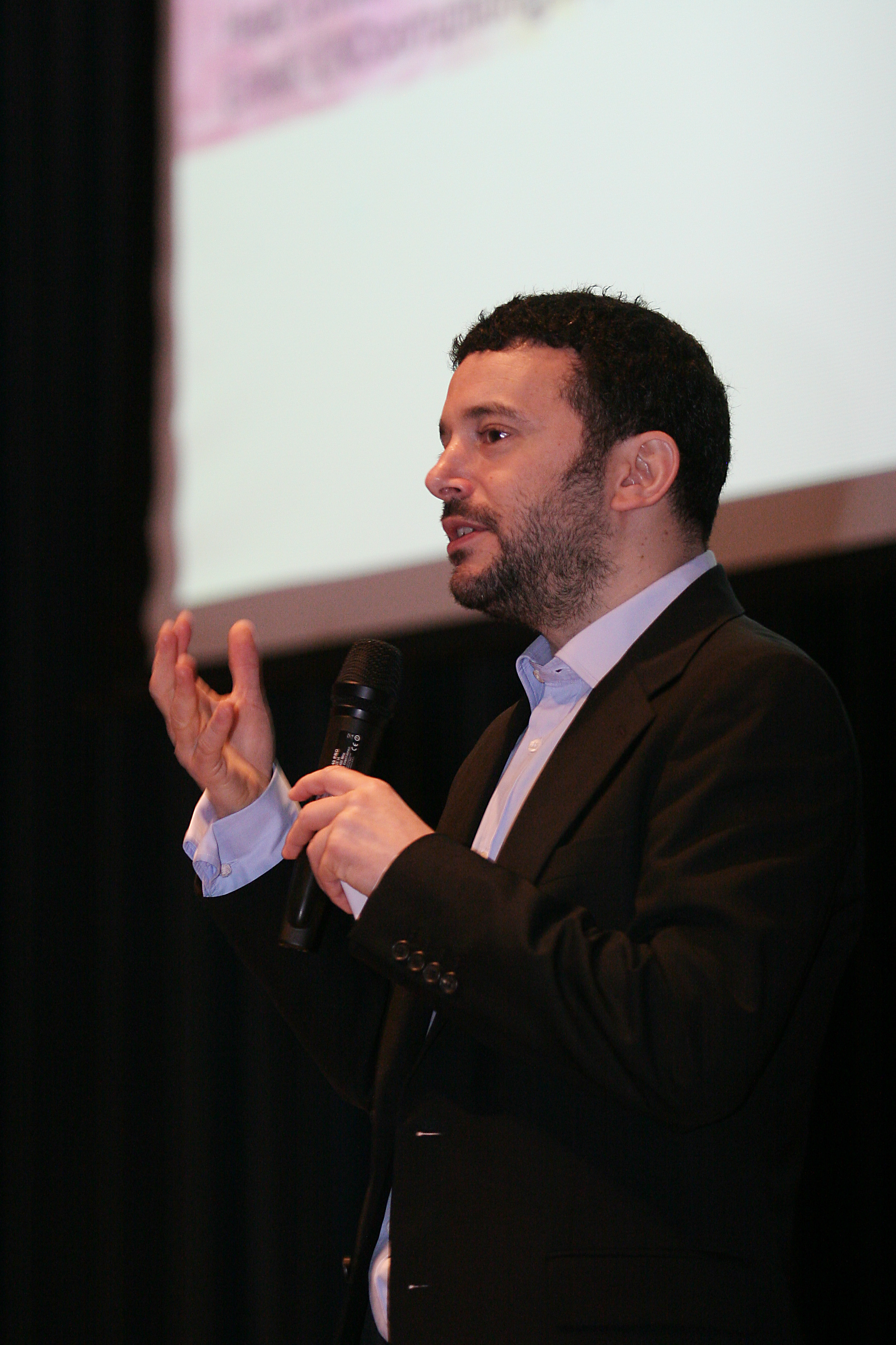 Filósofo e matemático inglês Alex Bellos no primeiro encontro do Fronteiras do Pensamento - Diálogos com Professores 2011.